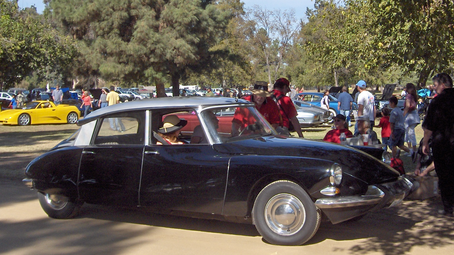 Il sagit d'un modèle export US: clignotants avant spécifiques. Et il sagit d'une DS plutôt qu'une ID, visible par la couleur grise du joint de pare brise, noir sur une ID. Le toit est peind en gris argent certainement. De plus, les cornets de clignotants arrière étaient en plastique rouge et non en métal sur une ID de cette époque. Il s'agit à l'évidence d'une DS